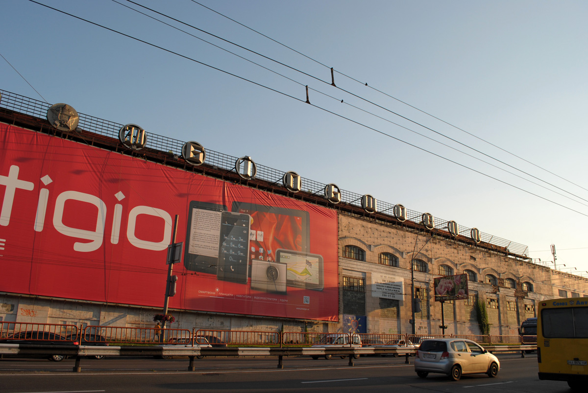 Завод Я. Гретера та О. Криваненка, робітники якого під час революції 1905 року створили «Шулявську робітничу республіку»; у жовтні 1917 року та січні 1918 року брали участь у збройному повстанні; працювали Герої Радянського Союзу, учасники Другої Світової війні, Київ, Гетьмана Вадима вул., 2-4